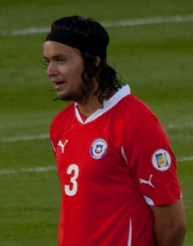 Waldo Ponce durante un partido válido por las Clasificatorias Sudamericanas a Brasil 2014 entre Uruguay y Chile